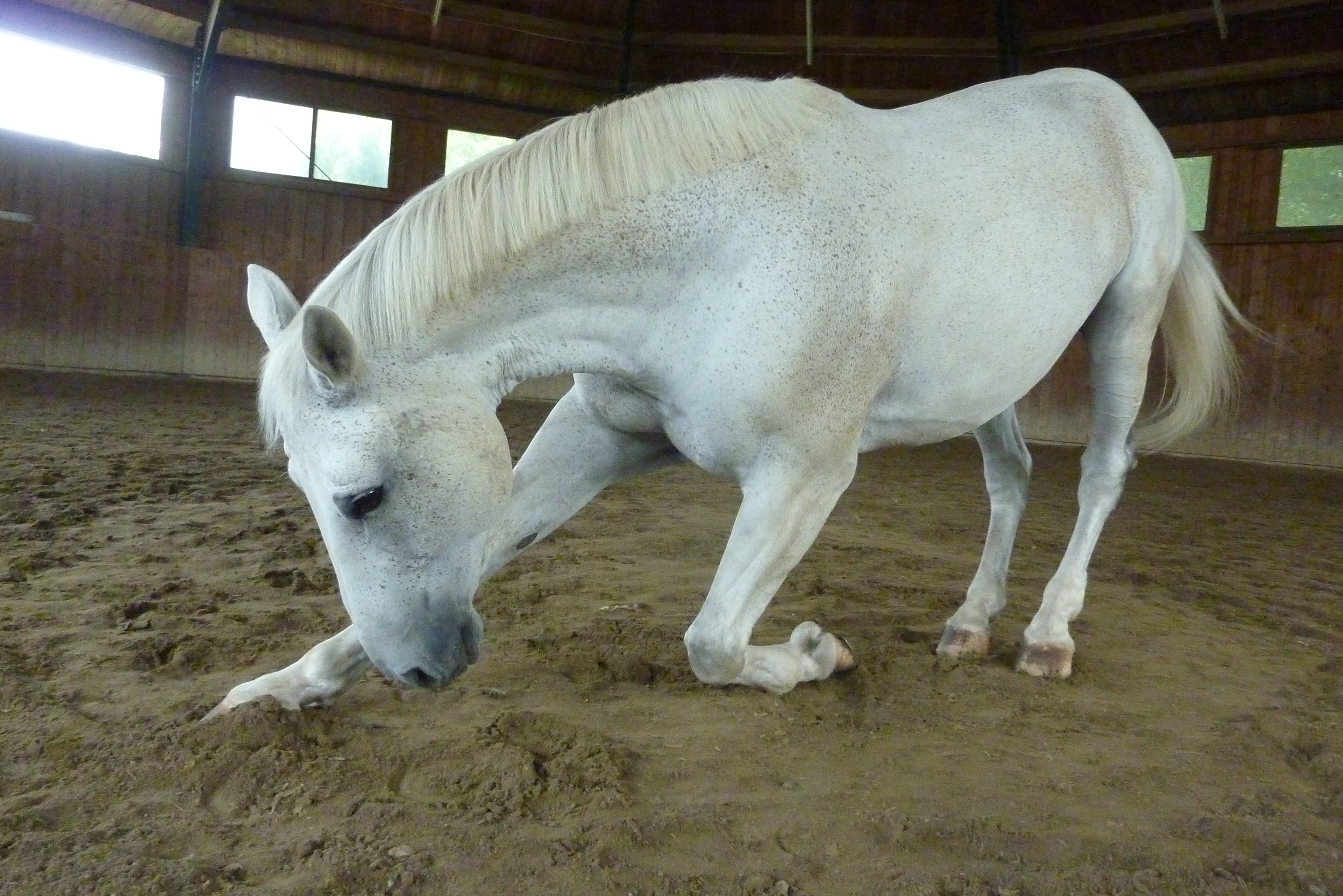 Pferd macht ein Kompliment (Zirkuslektion)